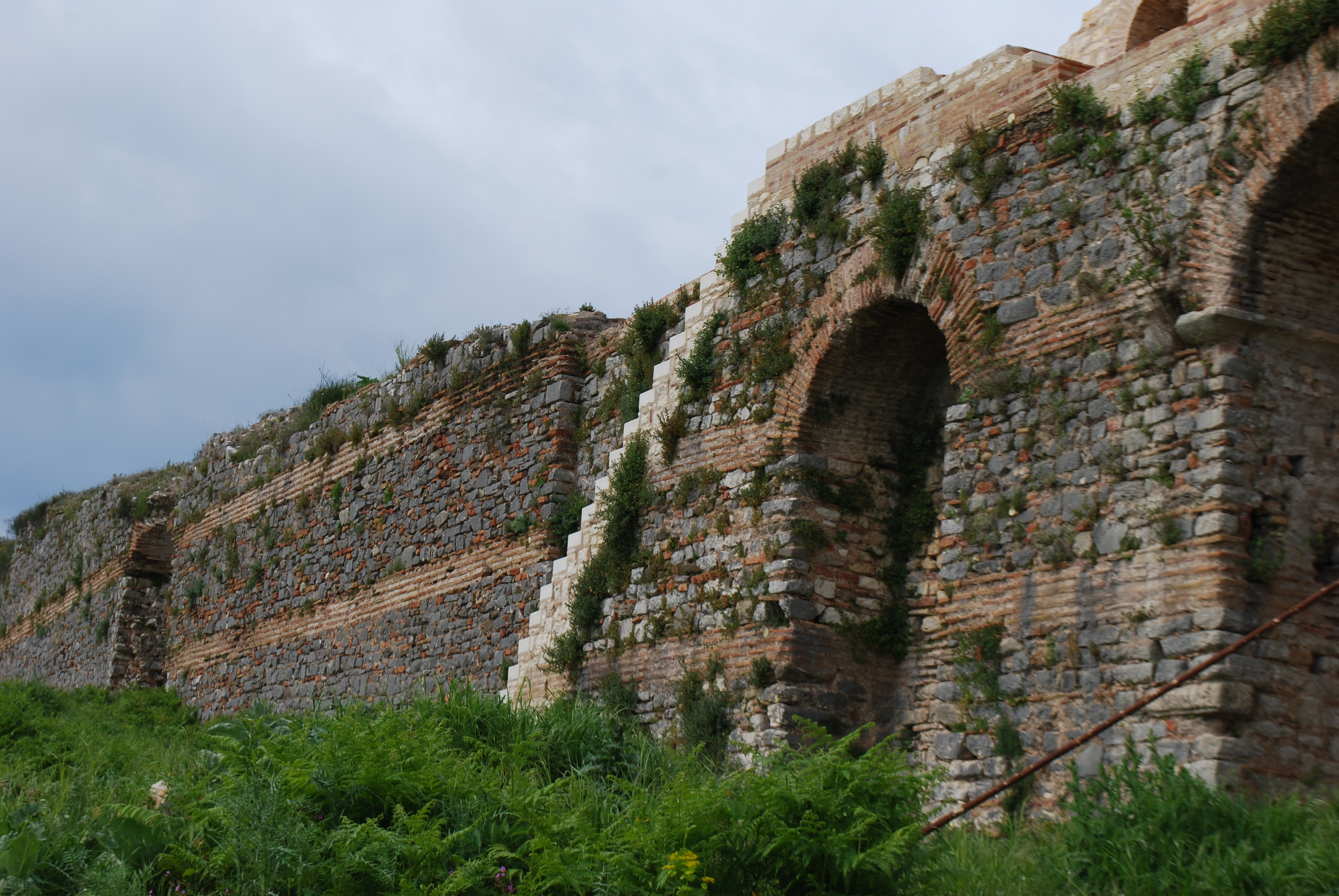 Vue de Nicopolis en Epire.